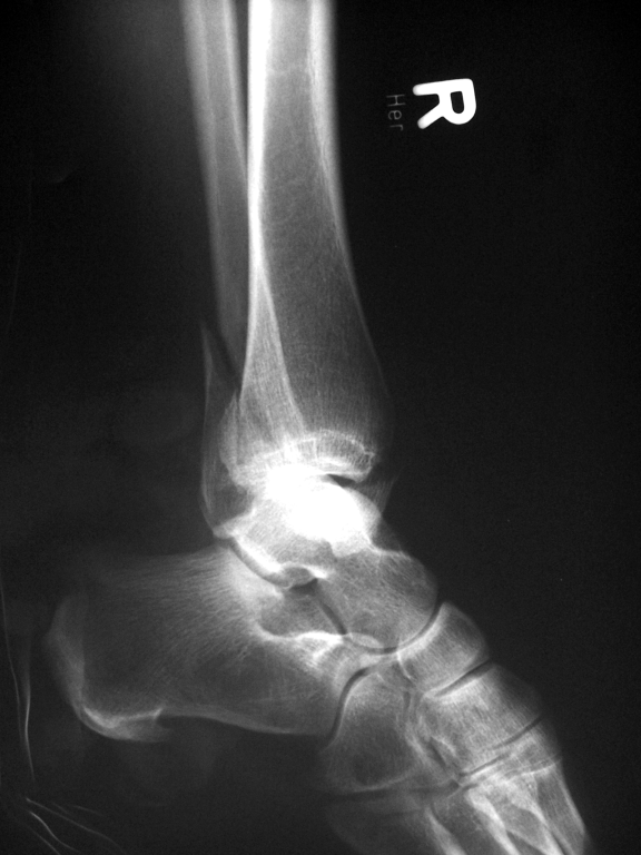 Bimalleolarfraktur